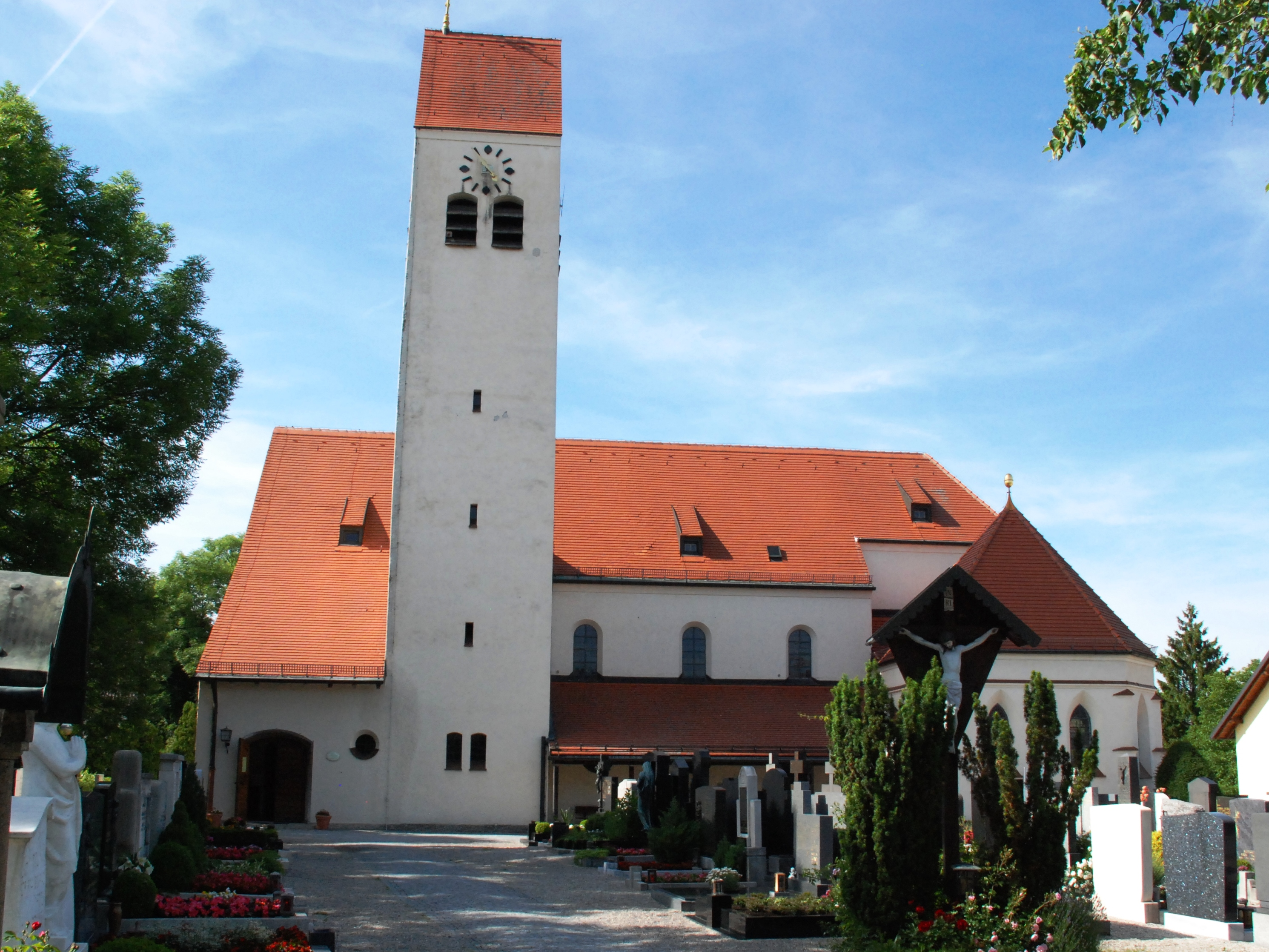 Denkmalgeschützte katholische Pfarrkirche "St. Peter und Paul" in Aschheim, Landkreis München